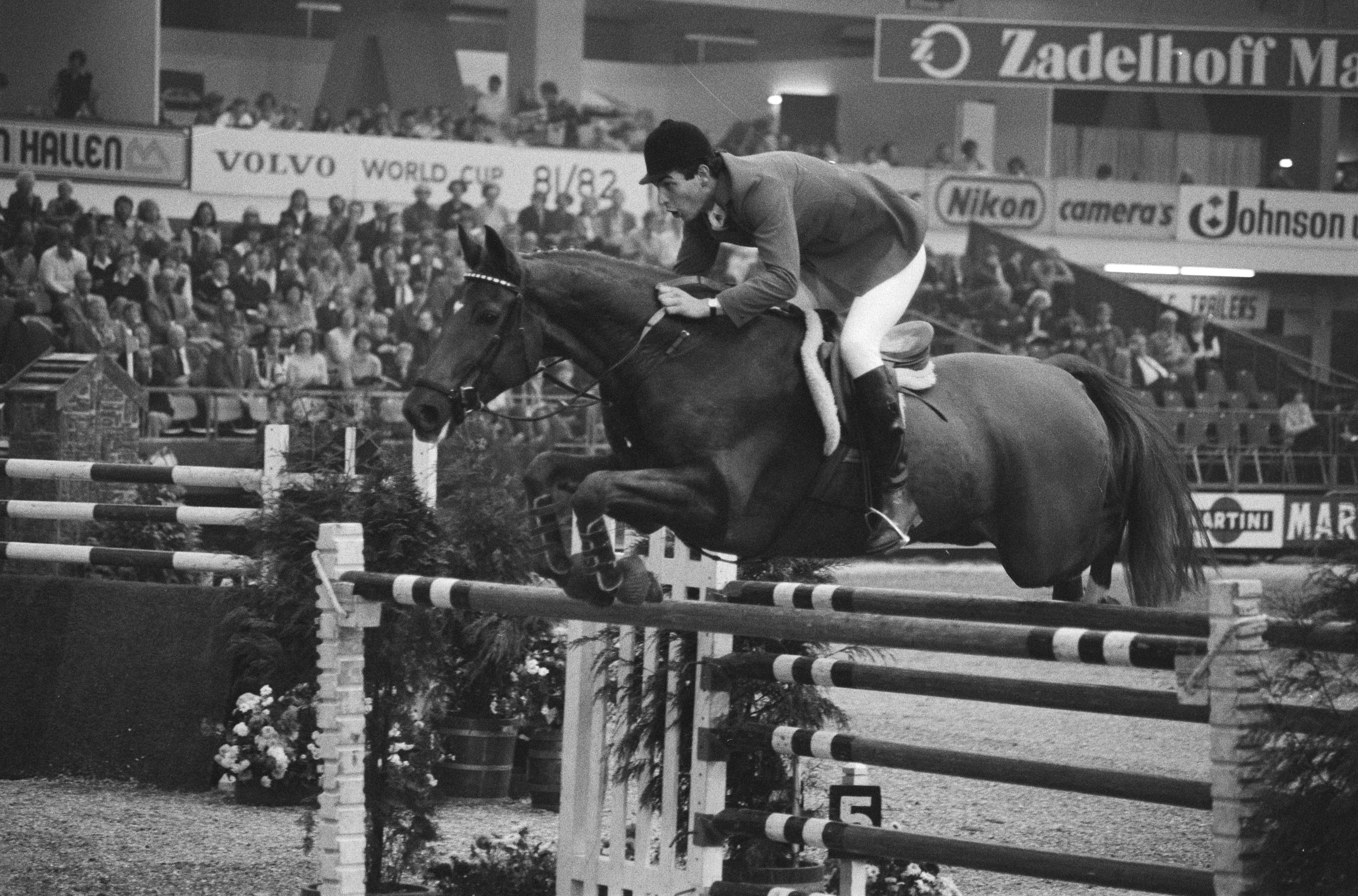 Collectie / Archief : Fotocollectie Anefo Reportage / Serie : Jumping Amsterdam in de RAI; Grote Prijs van Amsterdam Beschrijving : Emiel Hendrix (Nederland) op Livius in aktie Datum : 1 november 1981 Locatie : Amsterdam, Noord-Holland Trefwoorden : Livius (paard), concours hippique Persoonsnaam : Hendrix, Emiel Instellingsnaam : Jumping Amsterdam Fotograaf : Antonisse, Marcel / Anefo Auteursrechthebbende : Nationaal Archief Materiaalsoort : Negatief (zwart/wit) Nummer archiefinventaris : bekijk toegang 2.24.01.05 Bestanddeelnummer : 931-7783